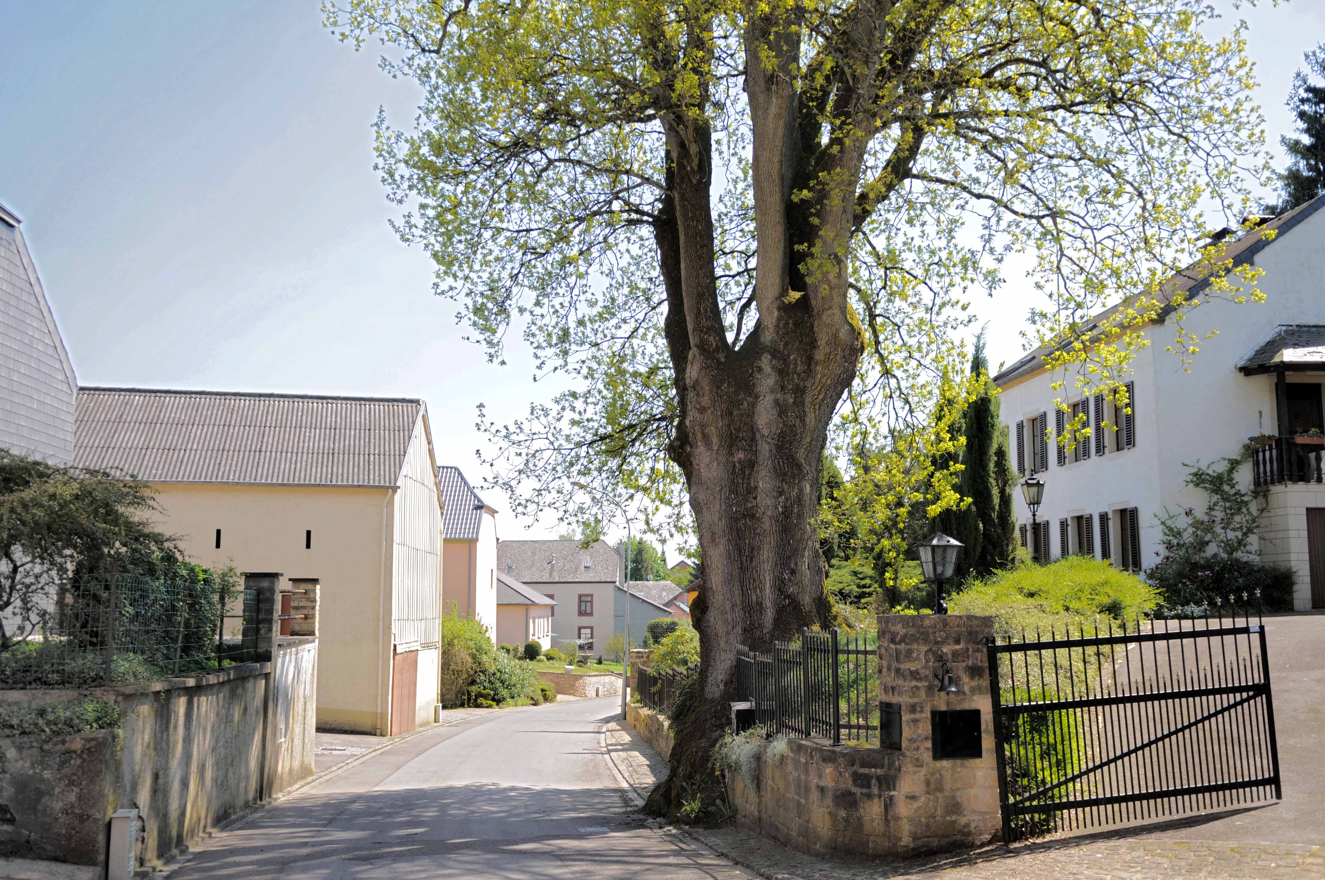 Eech zu Guedber. Kategorie:Gemeng Jonglënster + Kategorie:Bemierkenswäert Beem zu Lëtzebuerg